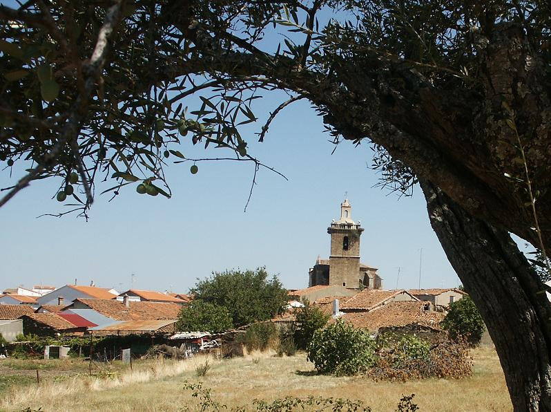 Guijo de Coria, Cáceres (España) autor: Justo José Moreno Mérida